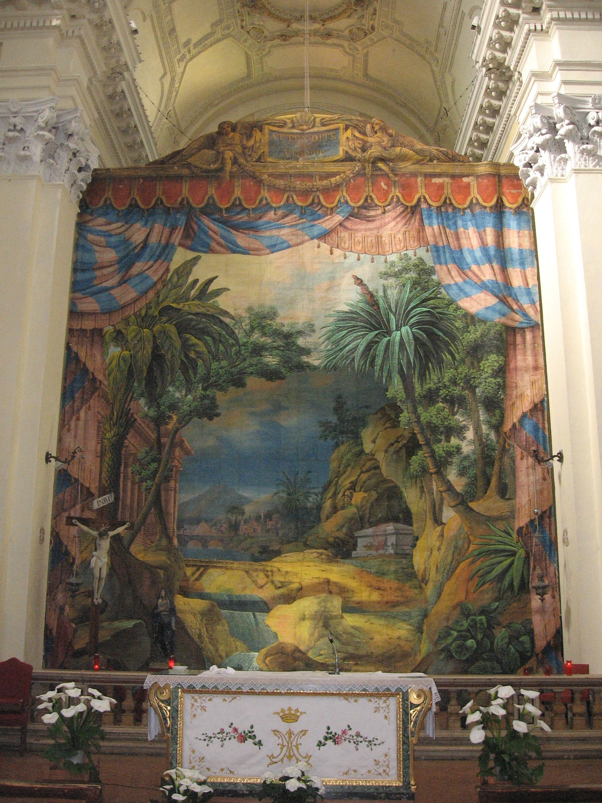 Apparato per il Venerdì Santo dipinto da Romolo Liverani per la Chiesa di Santa Maria dell'Angelo di Faenza